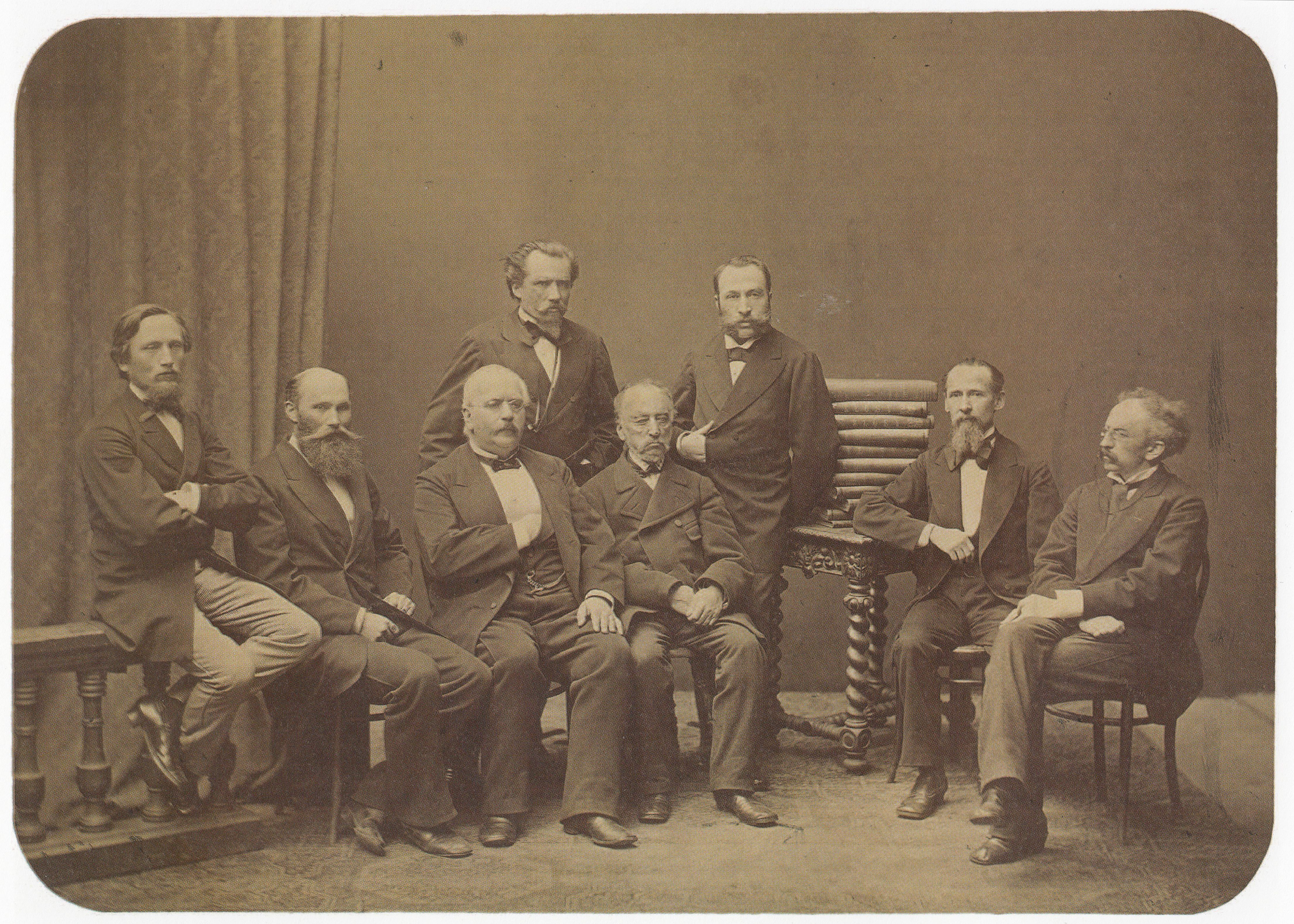 Redakcja tygodnika ilustrowanego "Kłosy". Stoją od lewej: Stanisław Krzemiński, Henryk Struve, Fryderyk Lowestam, Marcin Olszyński (stoi), Kazimierz W. Wójcicki, Salomon Lewental (stoi), Antoni Pietkiewicz (Adam Pług), Edward Lubowski